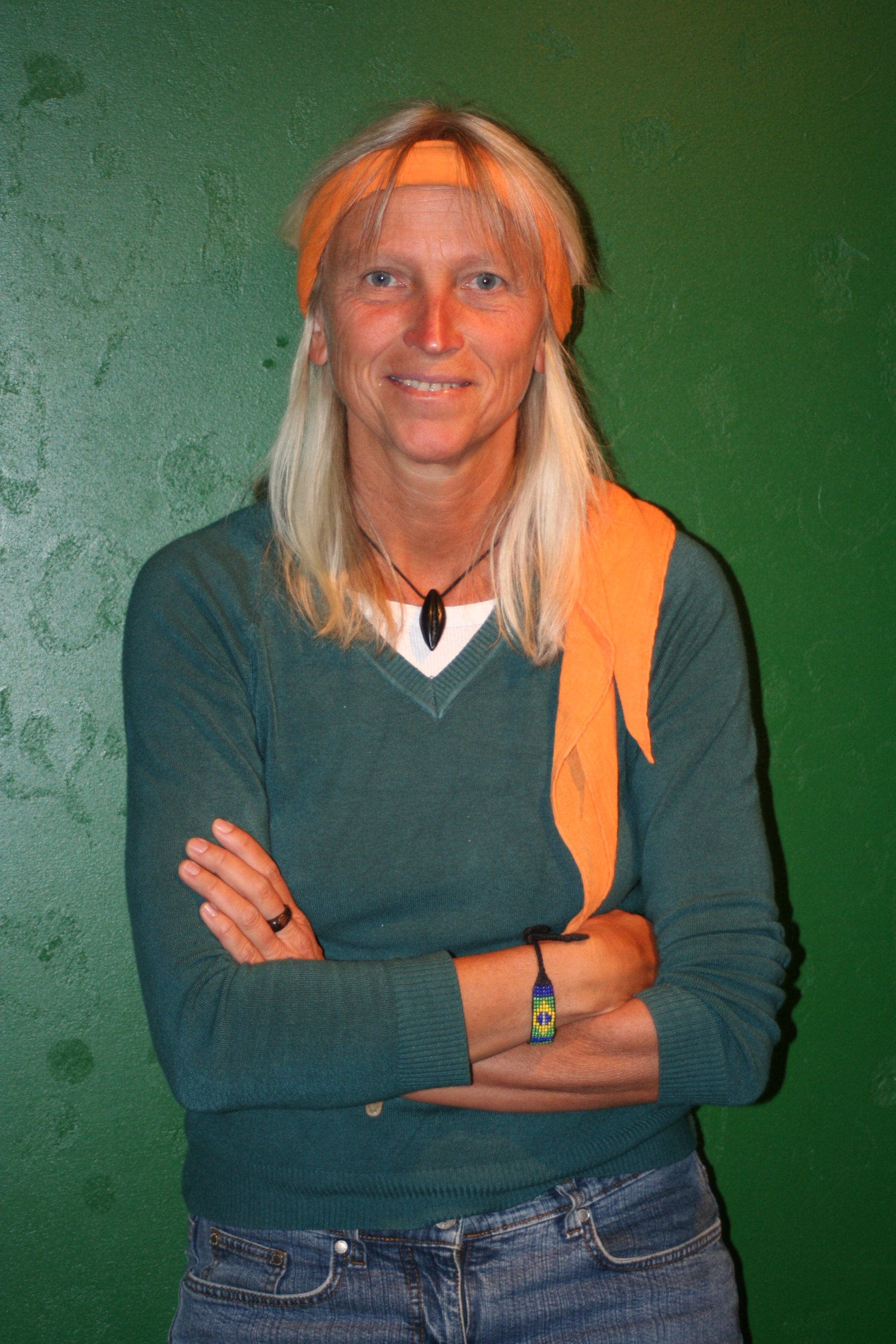 Christina Haverkamp